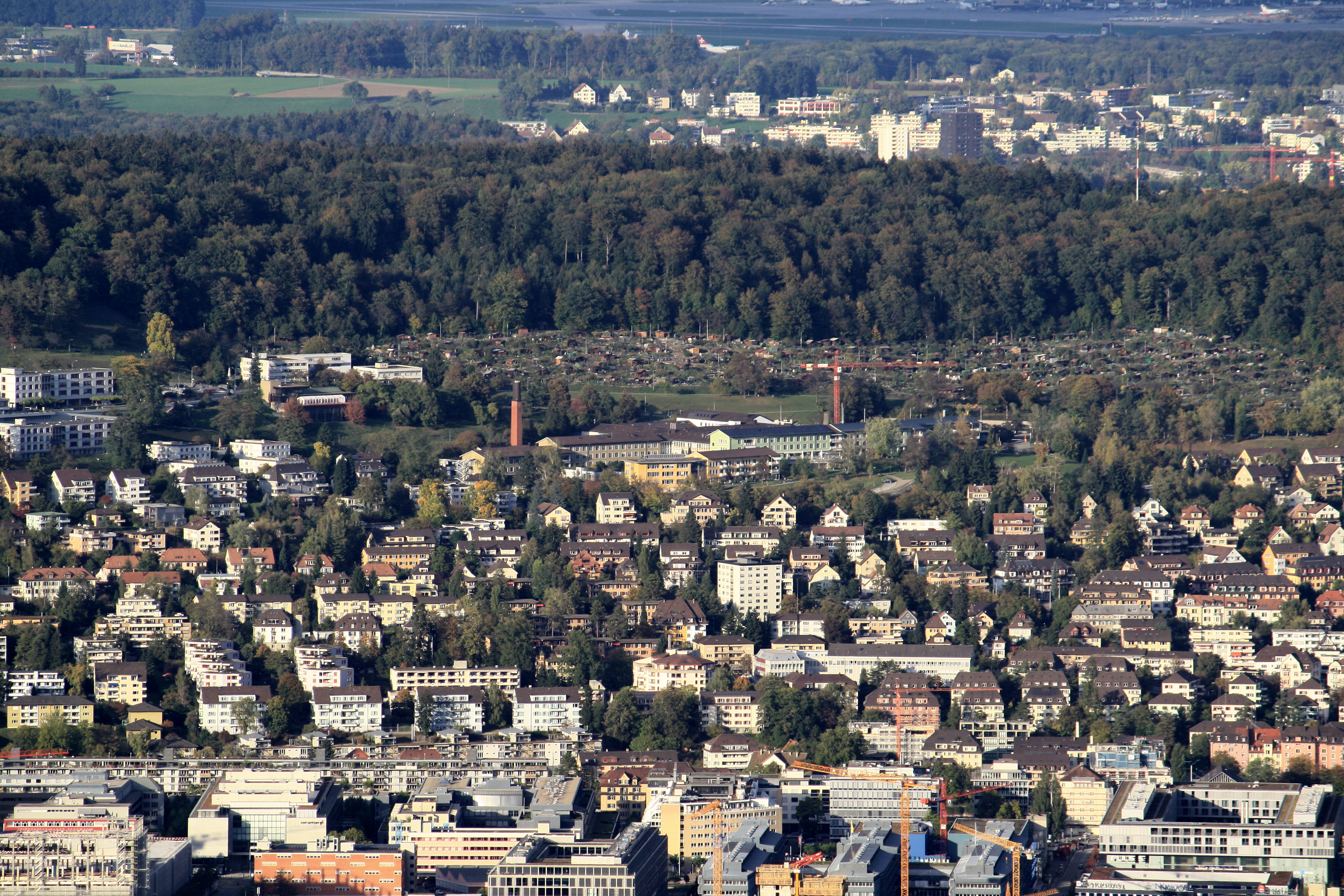 Stadtspital Waid on Käferberg-Waidberg hill and Zürich-Höngg, as seen from Uetliberg Aussichtsturm, Affoltern and Zürich Airport in the background.